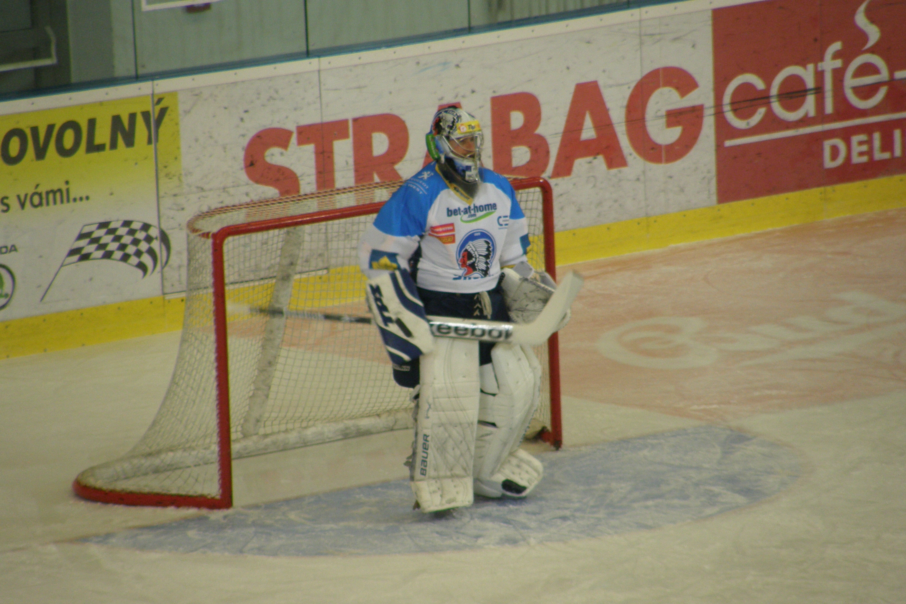 Adamov Svoboda v zápase Plzeň proti Brnu, Kajot Aréna (6.12.2011)